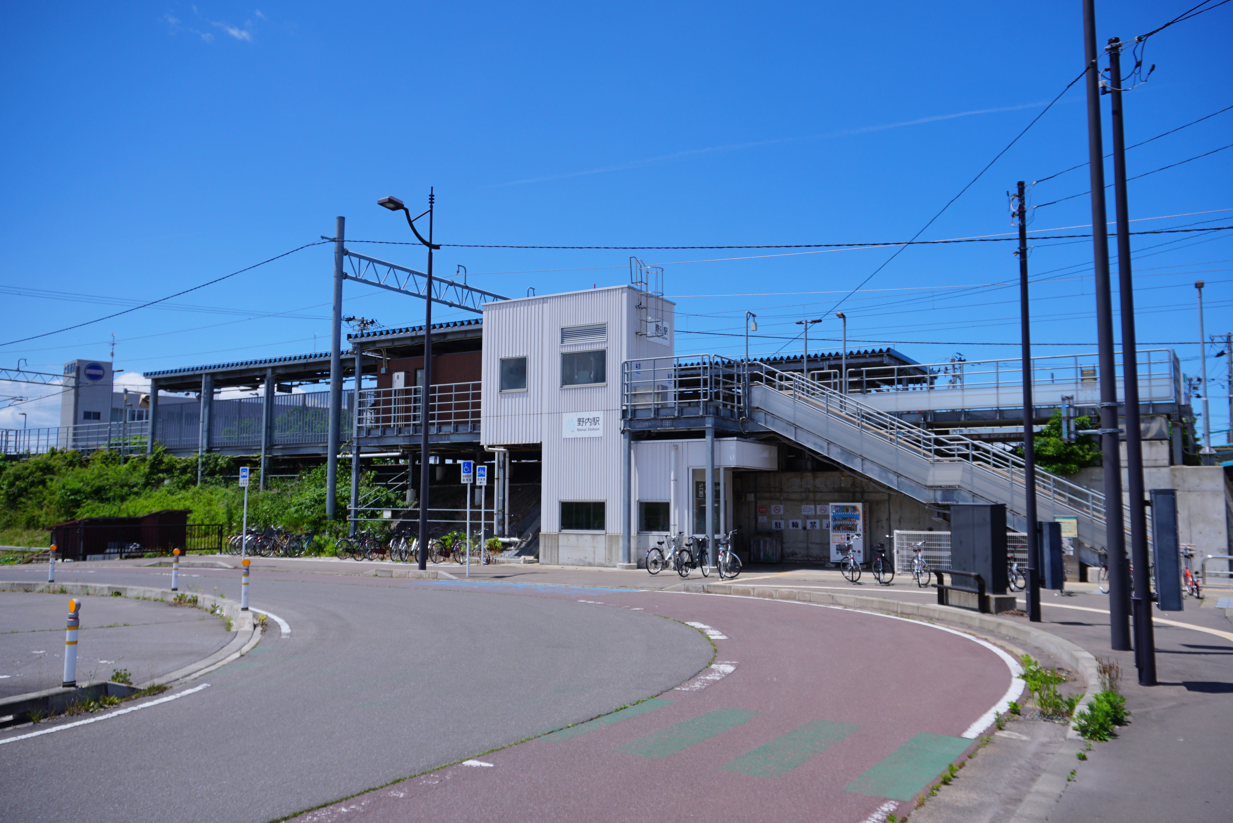 青い森鉄道 野内駅（青森県青森市）。東北新幹線盛岡以北の延伸開業に伴いかつての東北本線が第三セクターに移管された青い森鉄道線であるが、野内駅は青い森鉄道によって旧駅から移設され、実質的には新たに建設された駅である。